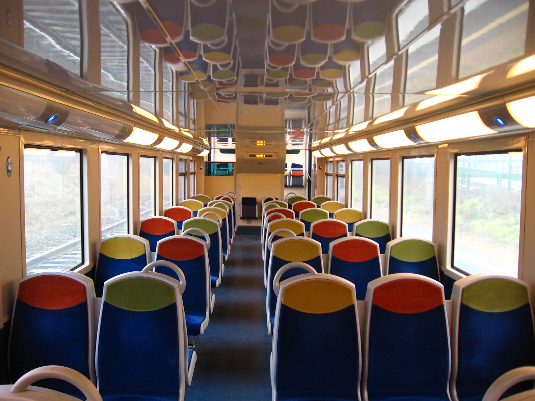 Intérieur d'une rame VB2N rénovée (étage inférieur)